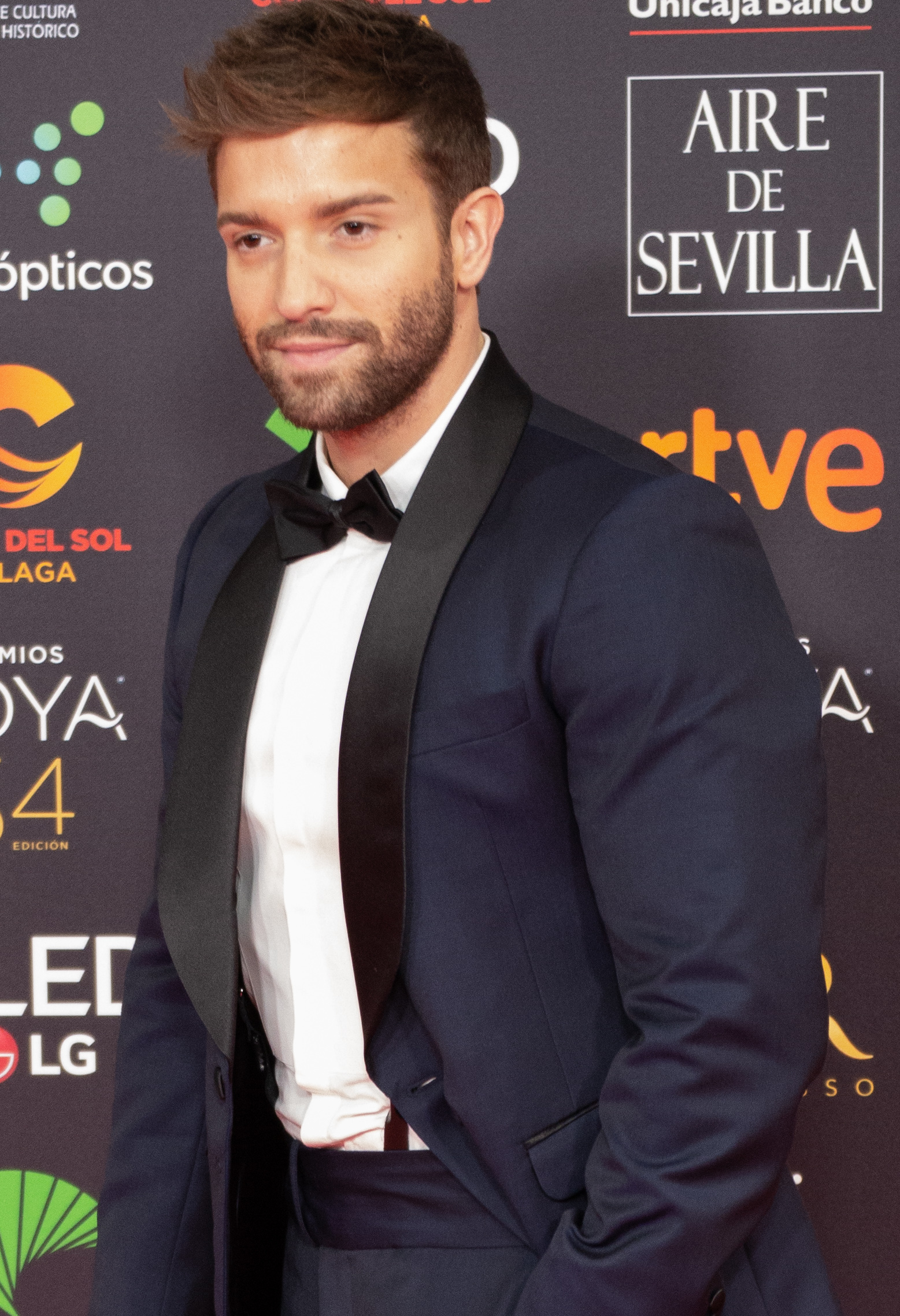 Pablo Alborán en la alfombra roja de la ceremonia de entrega de los Premios Goya 2020 celebrada en Málaga